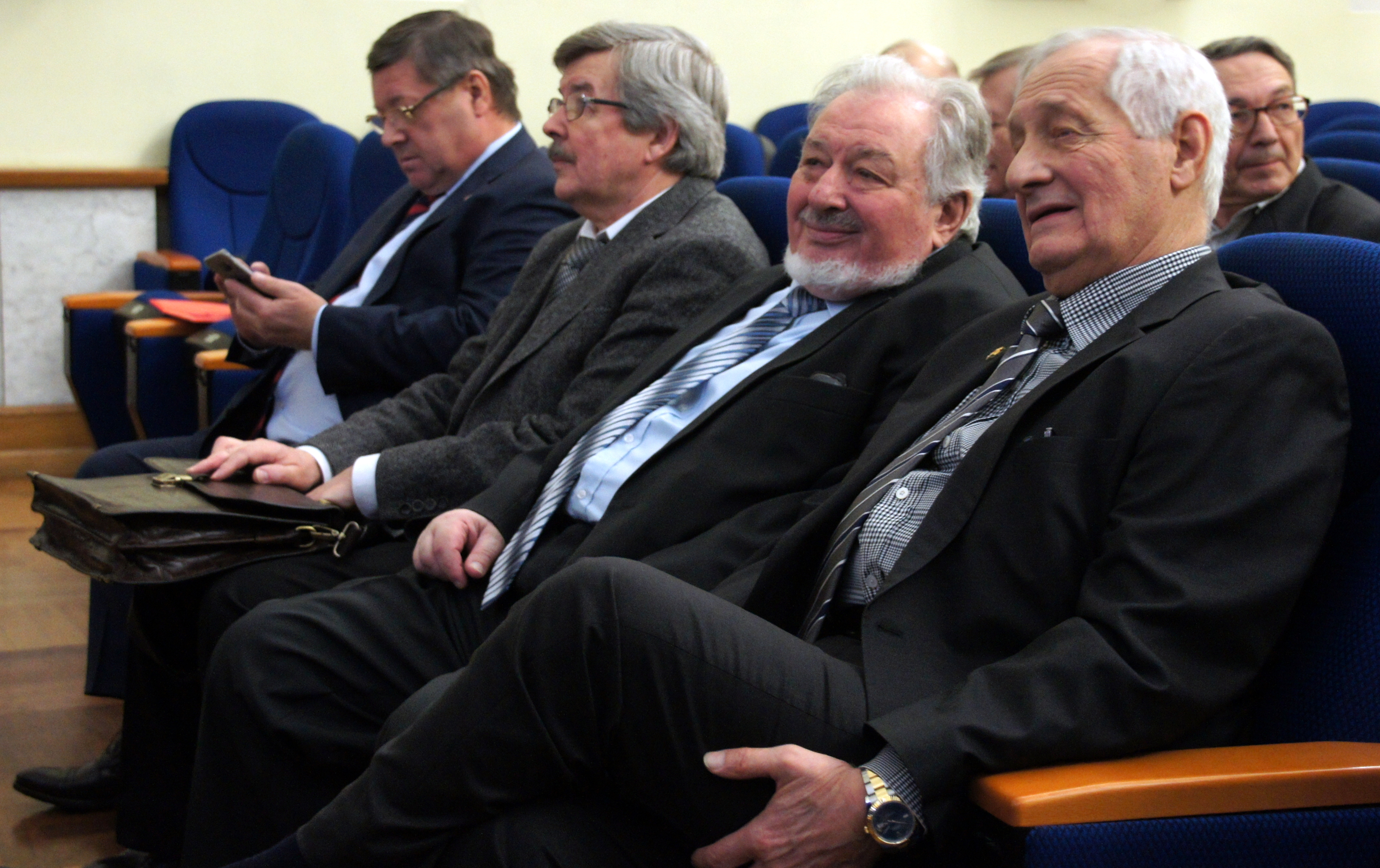 Академики РАН: Михаил Александрович Федонкин, Алексей Эмильевич Конторович, Эрик Михайлович Галимов.